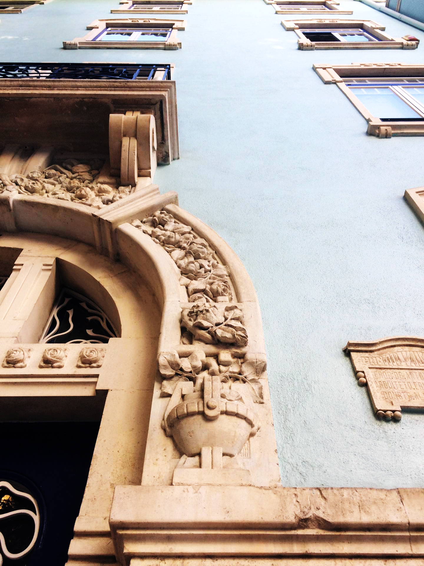 Edifício residencial, projecto da autoria do arquitecto Ernesto Korrodi, foi distinguido com o Prémio Valmor e Municipal de Arquitectura de 1917.